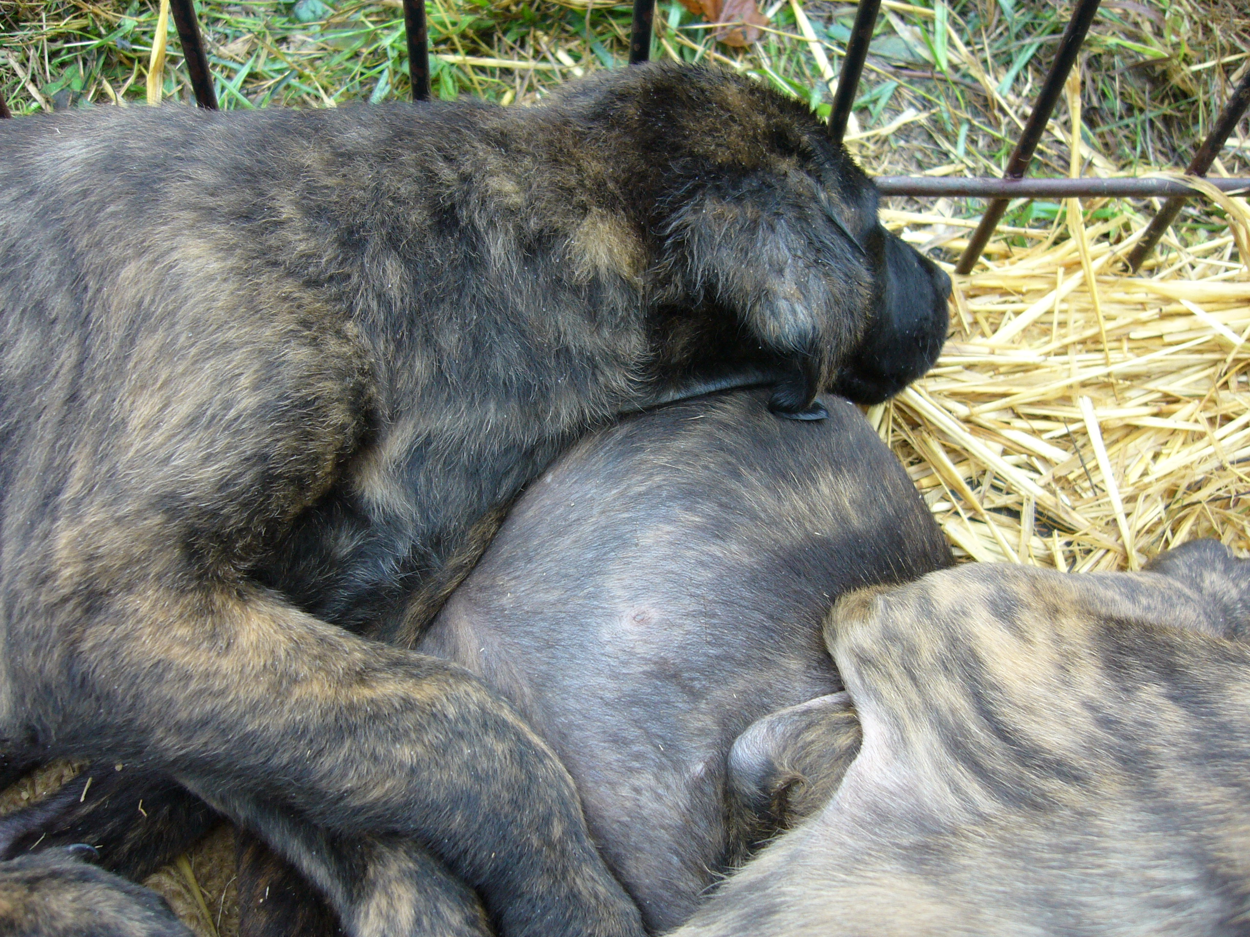 Billano txakurra. Txakurkumeak°